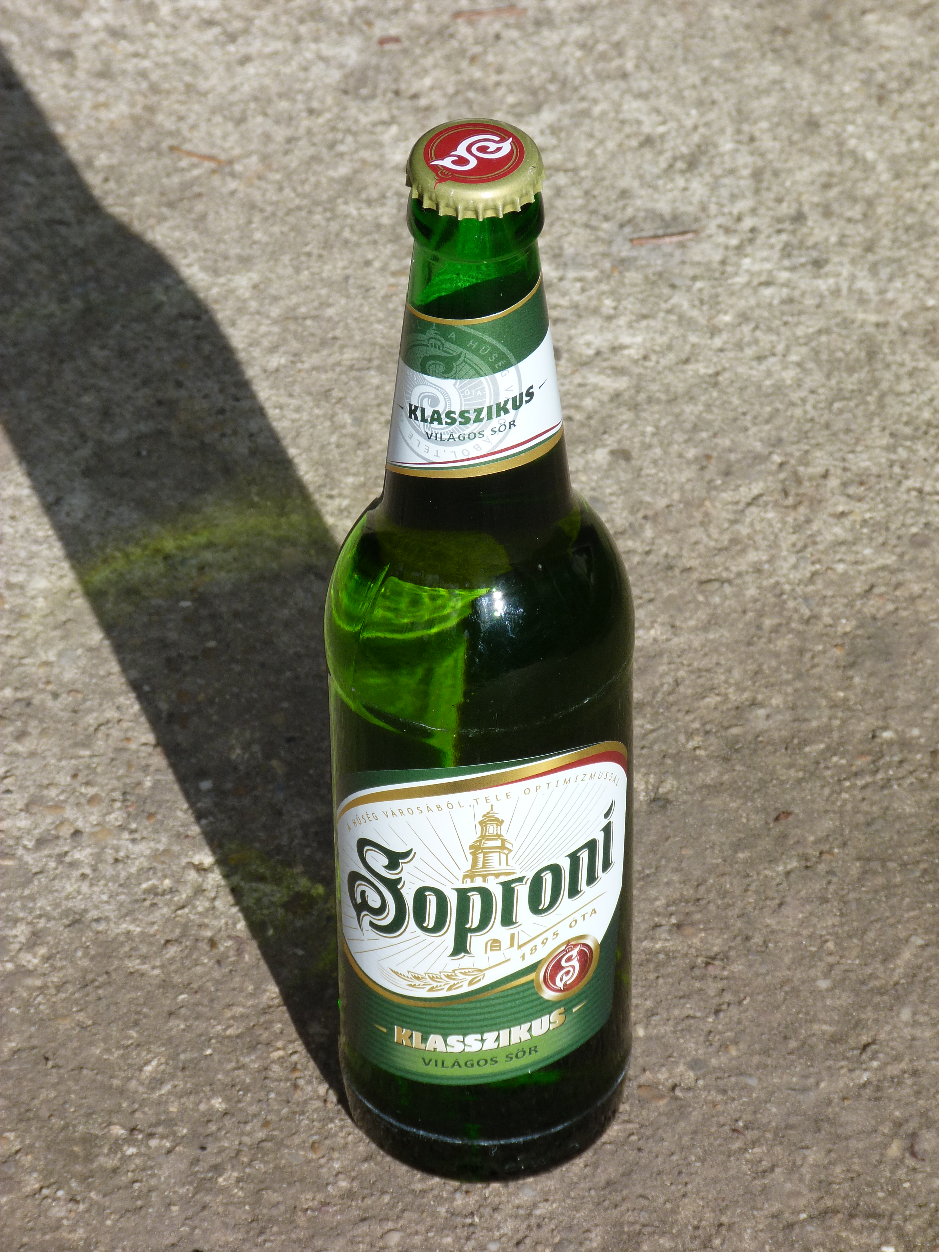 Soproni sör.